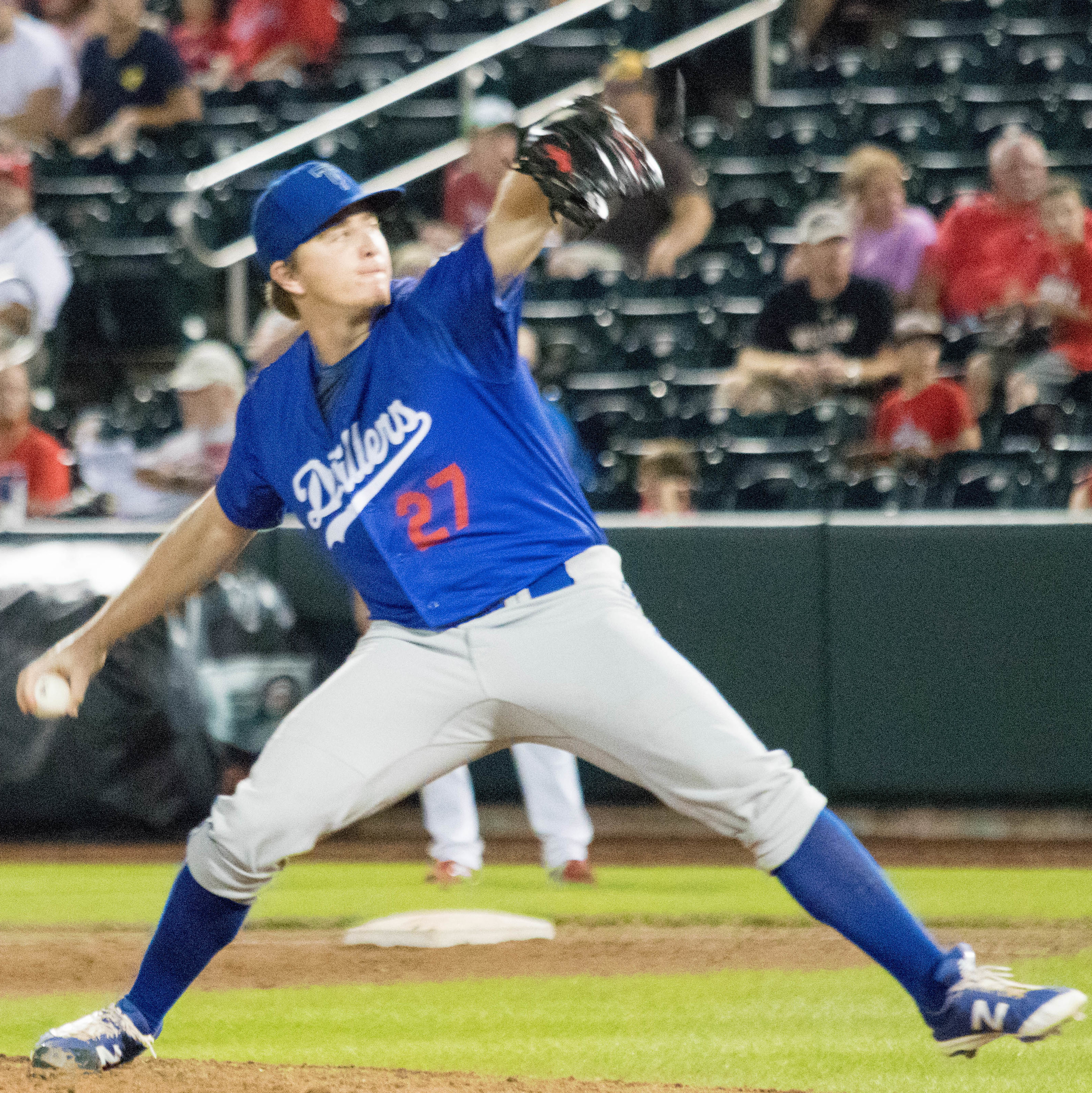 Josh Sborz 2016 (2)